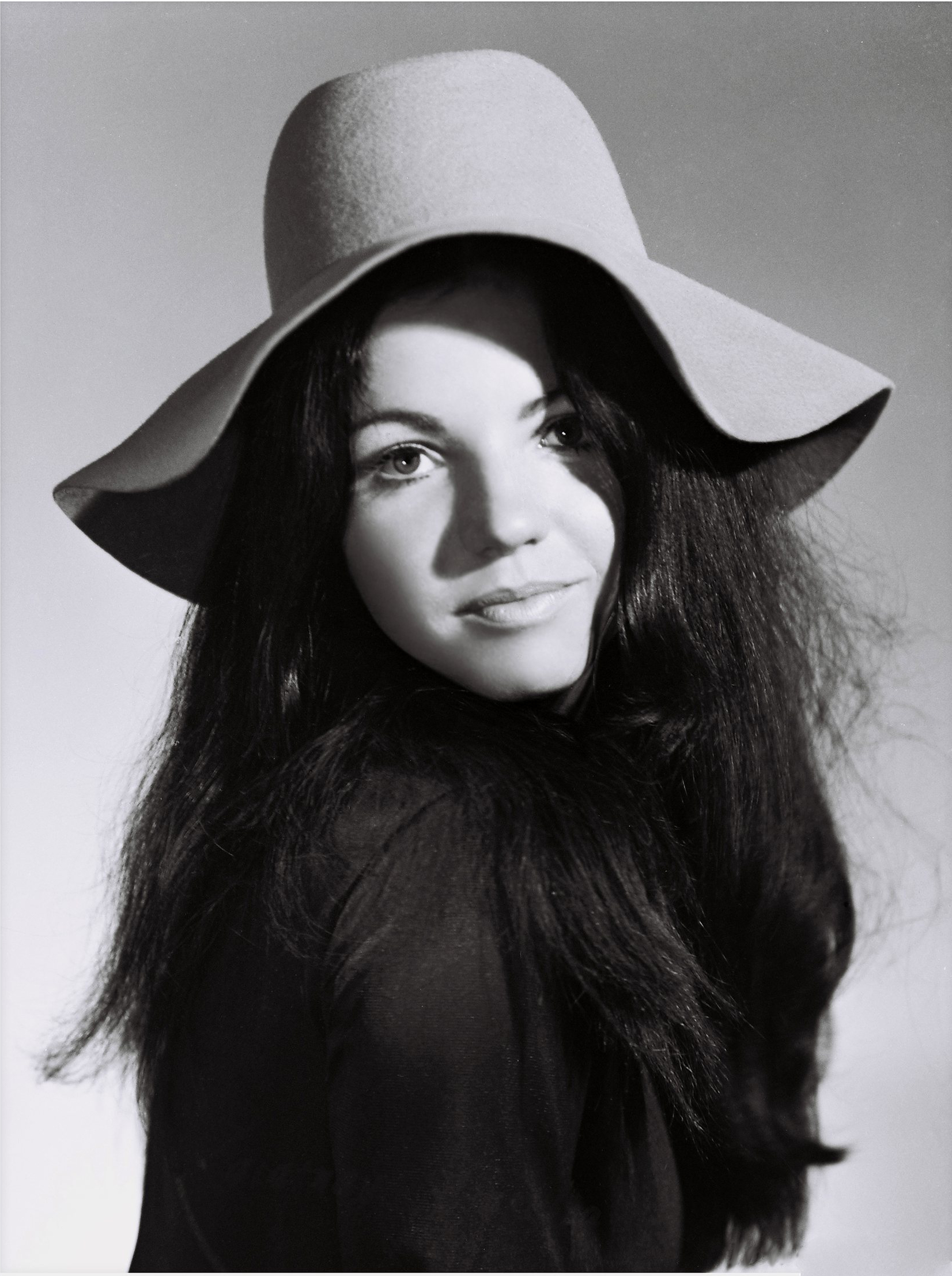 Zalatnay Sarolta magyar énekesnő